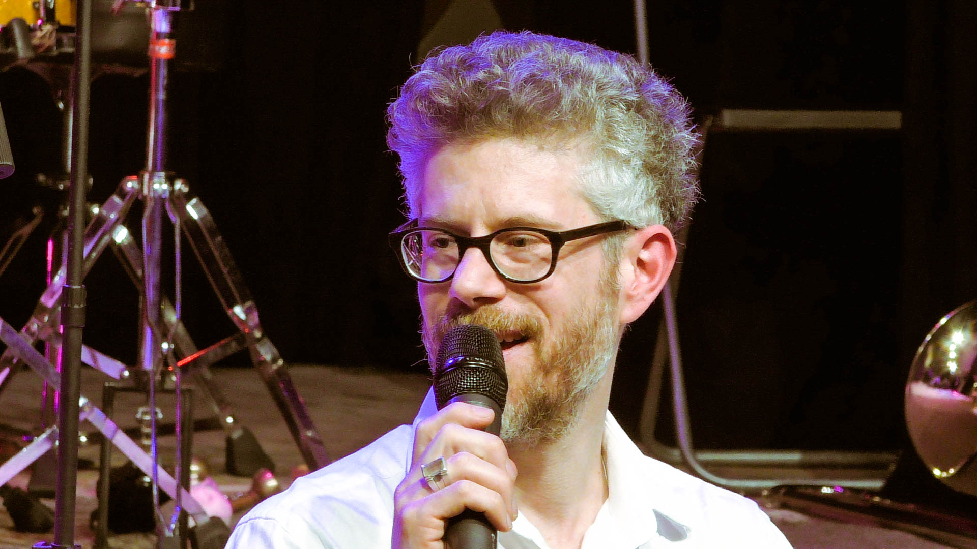 12.03.2017. Еврейский культурный центр на Никитской.